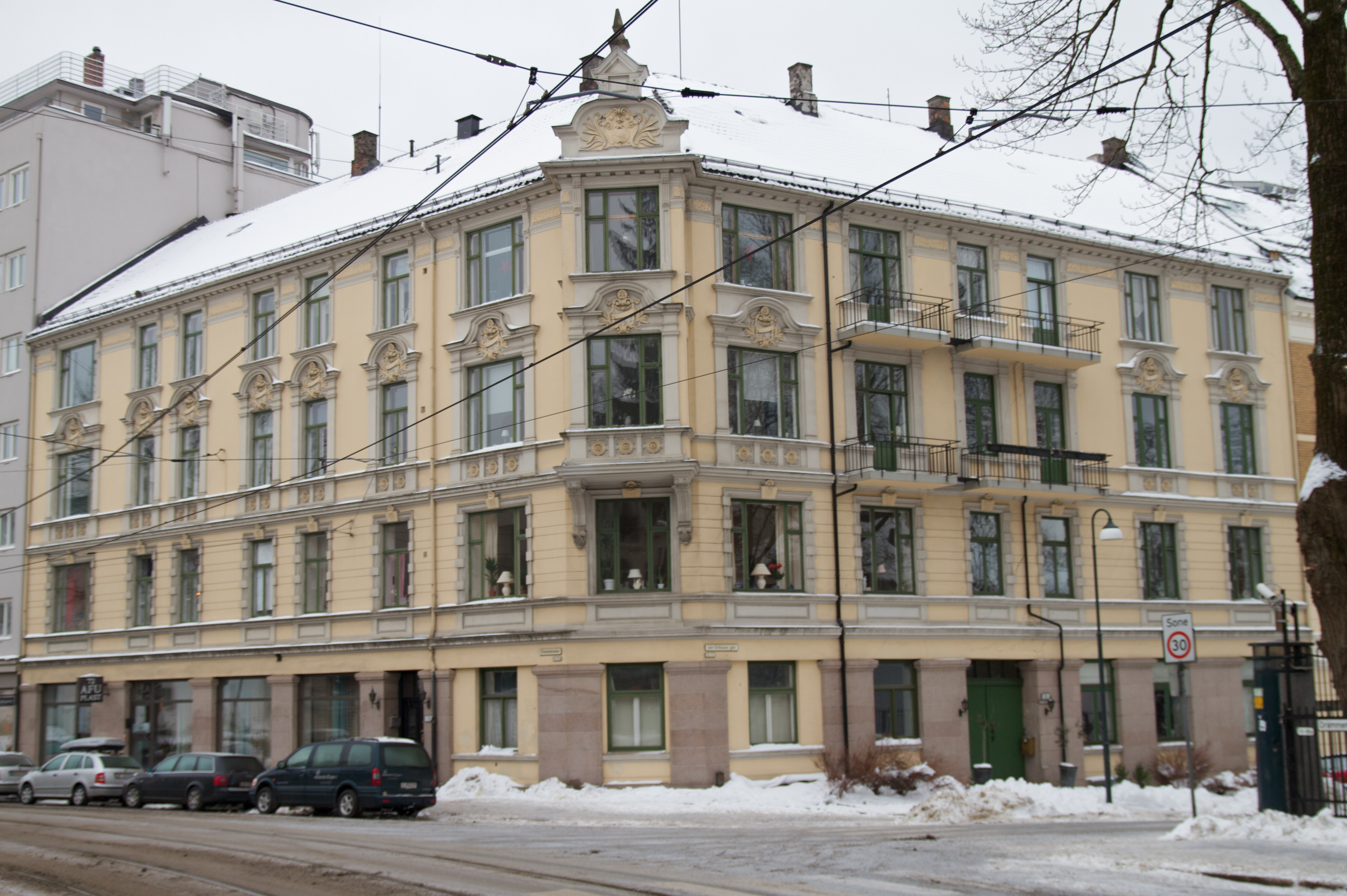 Drammensveien 72 i Oslo. Arkitekt: Ludwig Zapffe (1900).